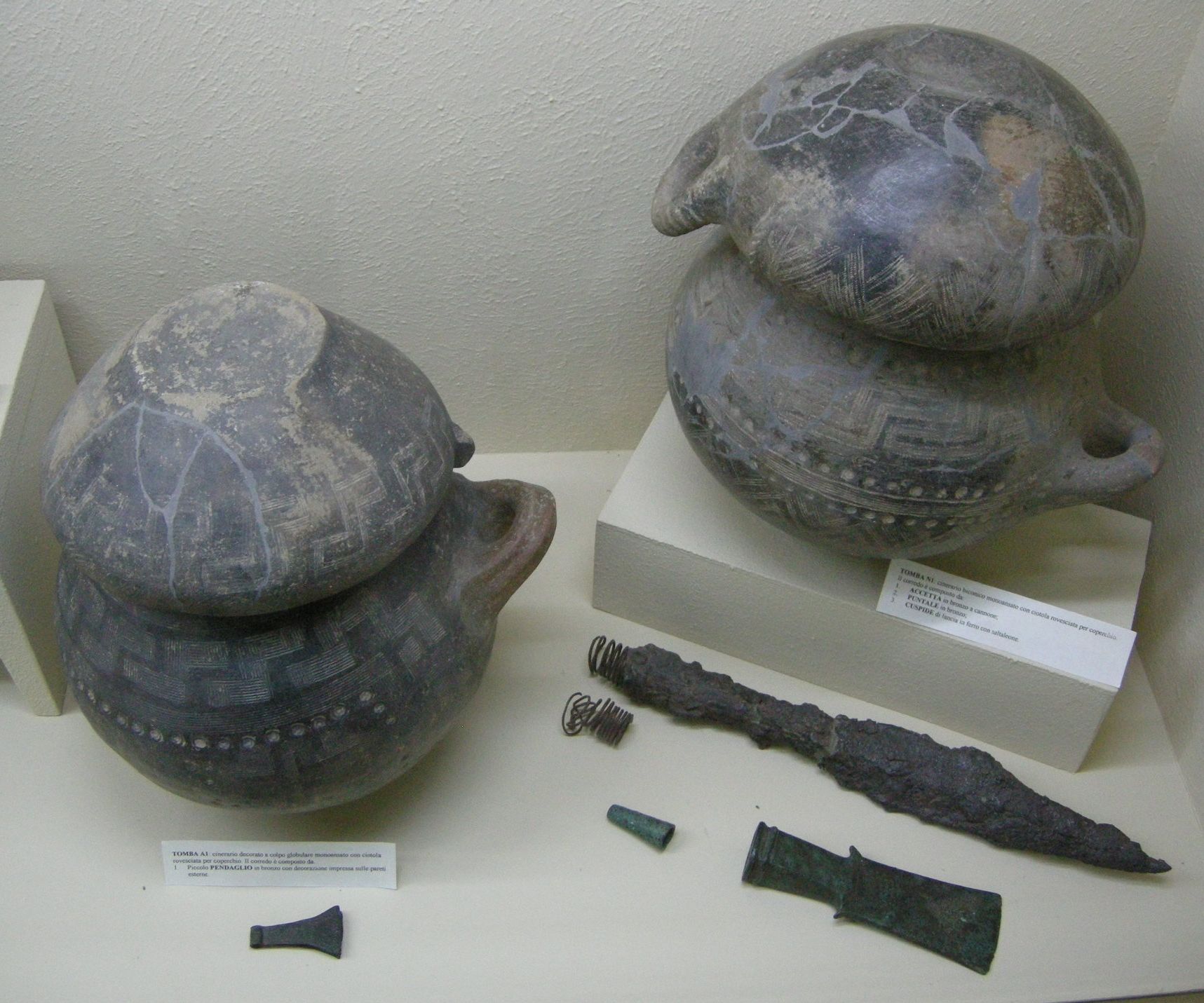 Museo guarnacci, urne cinerarie villanoviane